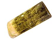 Ruwe Heliodoor. Helidoor is een licht geelgroene beryl.